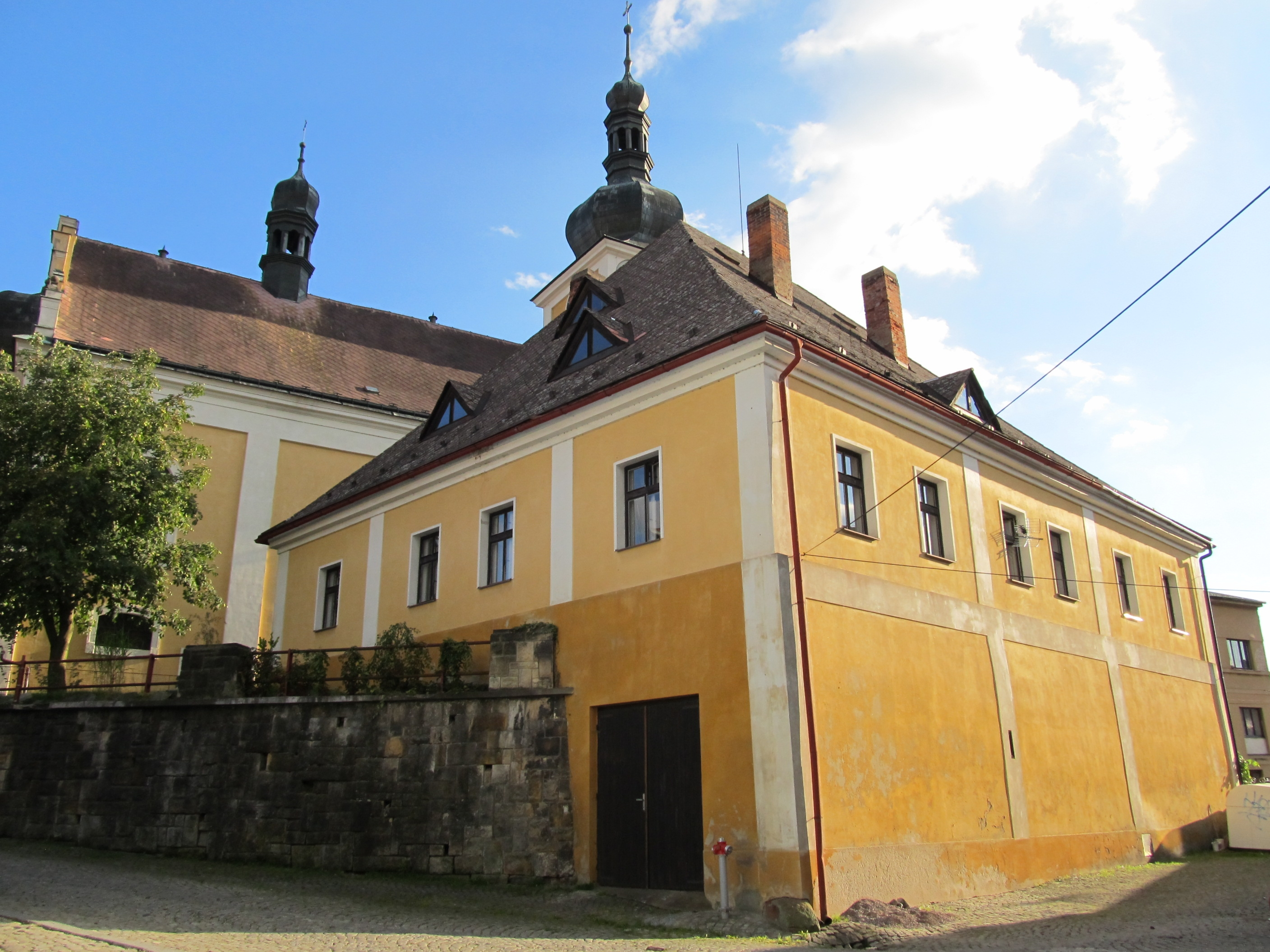 Fara (Úpice), nám. T. G. Masaryka 1, Úpice